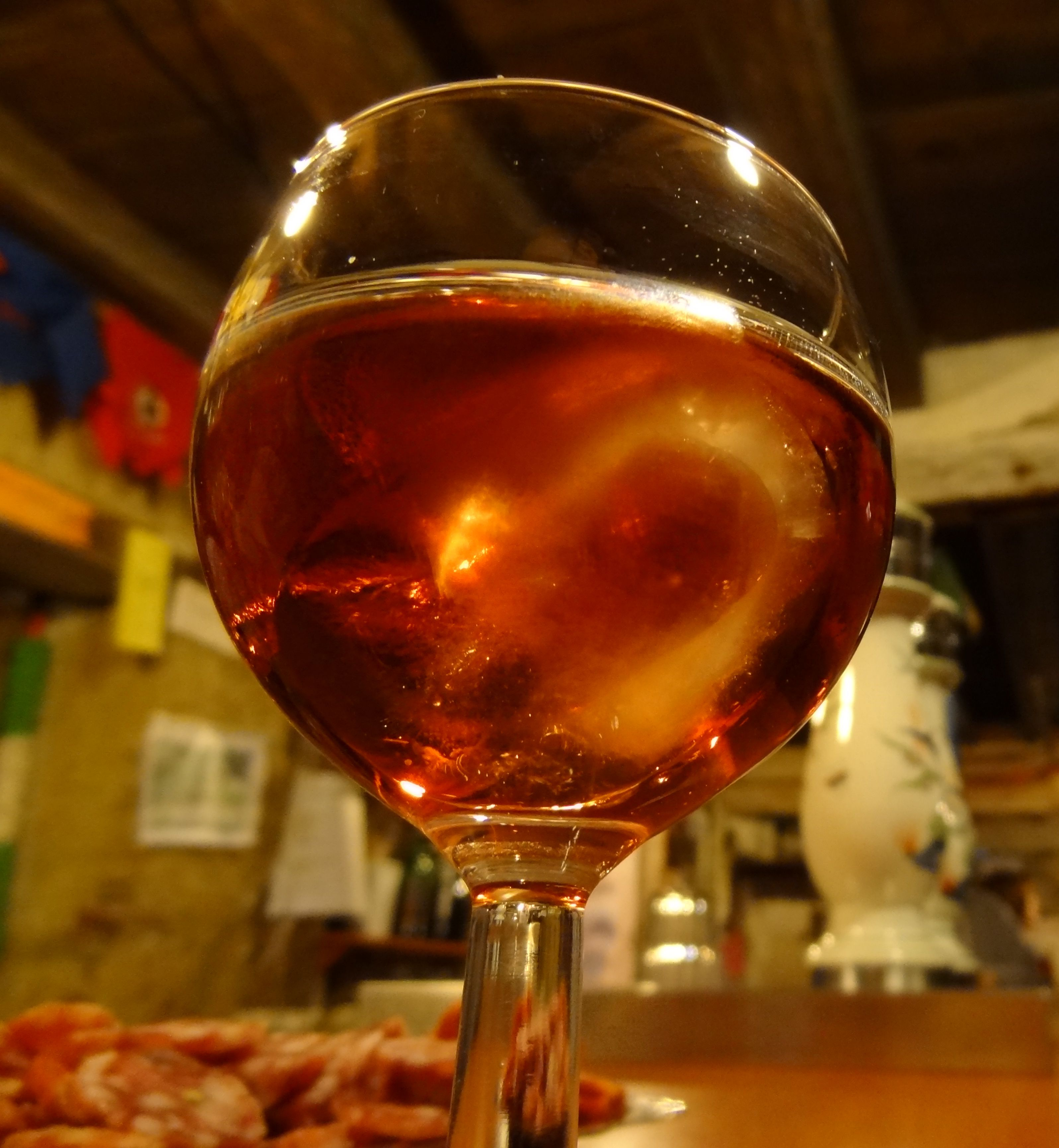 Garluche : apéritif artisanal des Landes fait à base de vin blanc, de rhum et de zestes d'oranges amères.